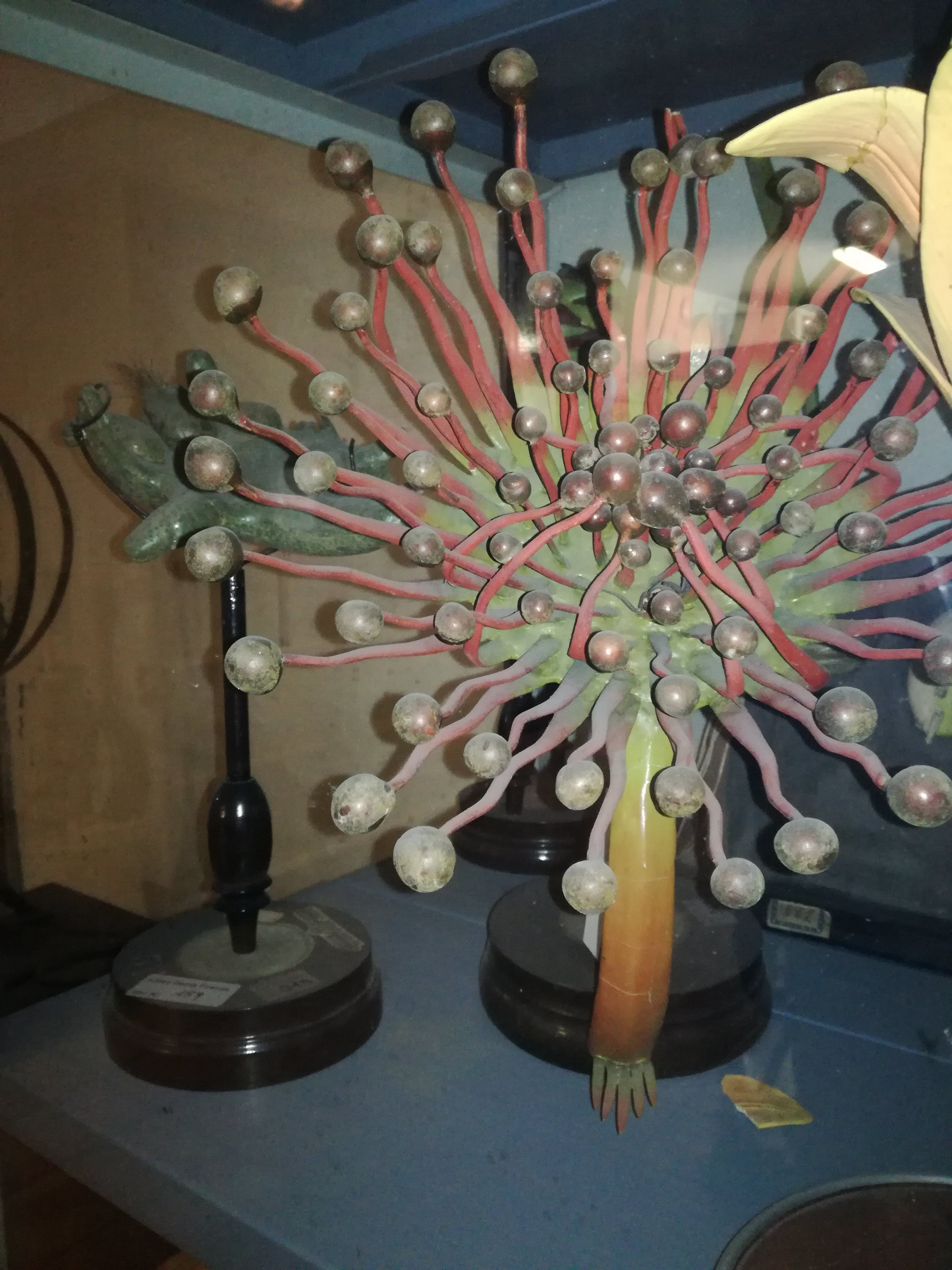 Modelli botanici della manifattura Brendel conservati al liceo ginnasio Dante di Firenze